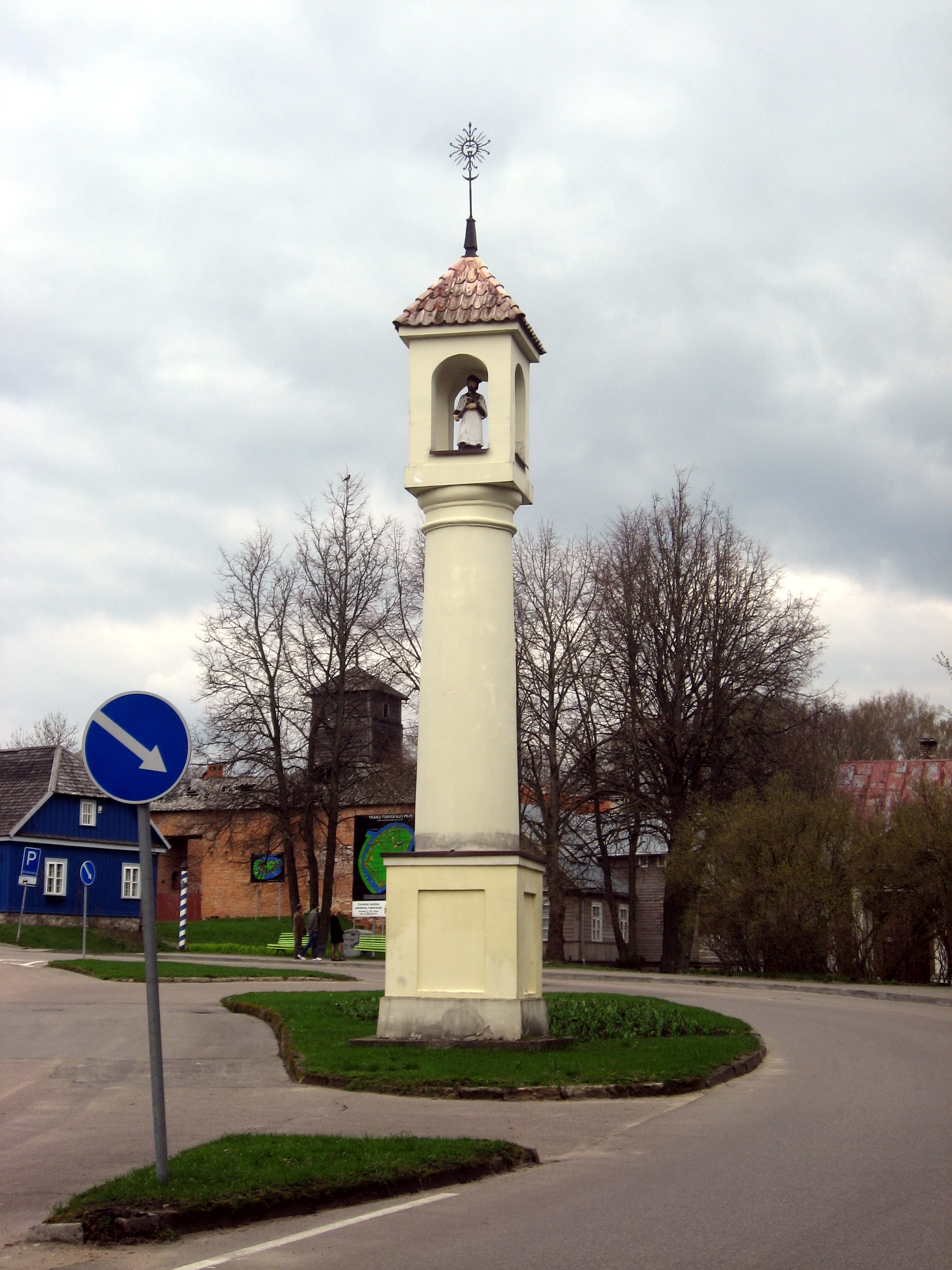 Svatý Jan Nepomucký, Trakai